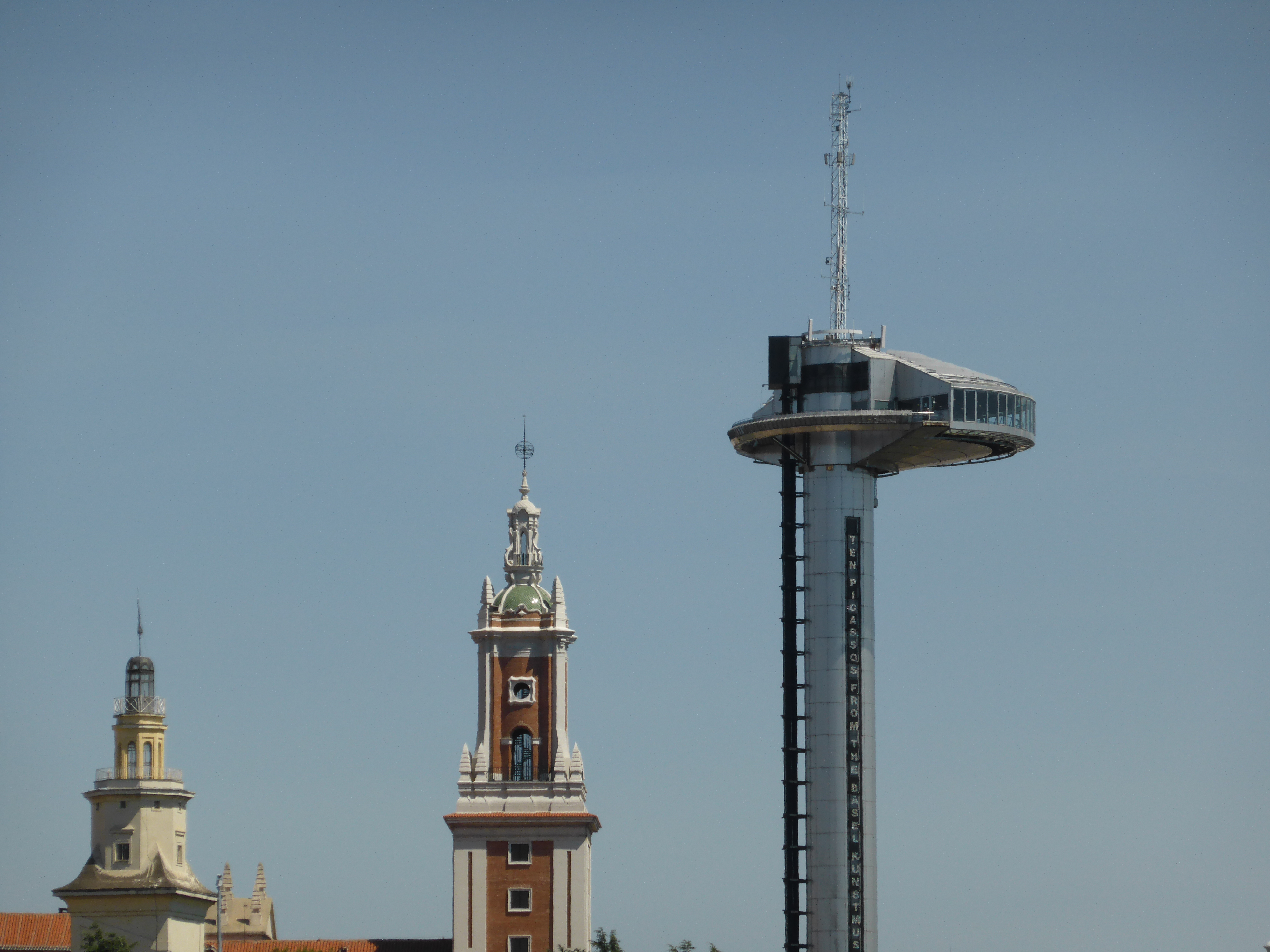 Tres torres madrileñas, de la Ciudad Universitaria. La primera, por la izquierda, es de la Escuela Técnica Superior de Ingenieros Navales (Universidad Politécnica de Madrid); inspirada en el faro de la "Torre de Hércules" de La Coruña. La segunda torre, que está en el centro, es del "Museo de América". Por último, la torre de la derecha, que es la más alta, es del "Faro de Moncloa", una torre con mirador turístico a 92 metros de altura.